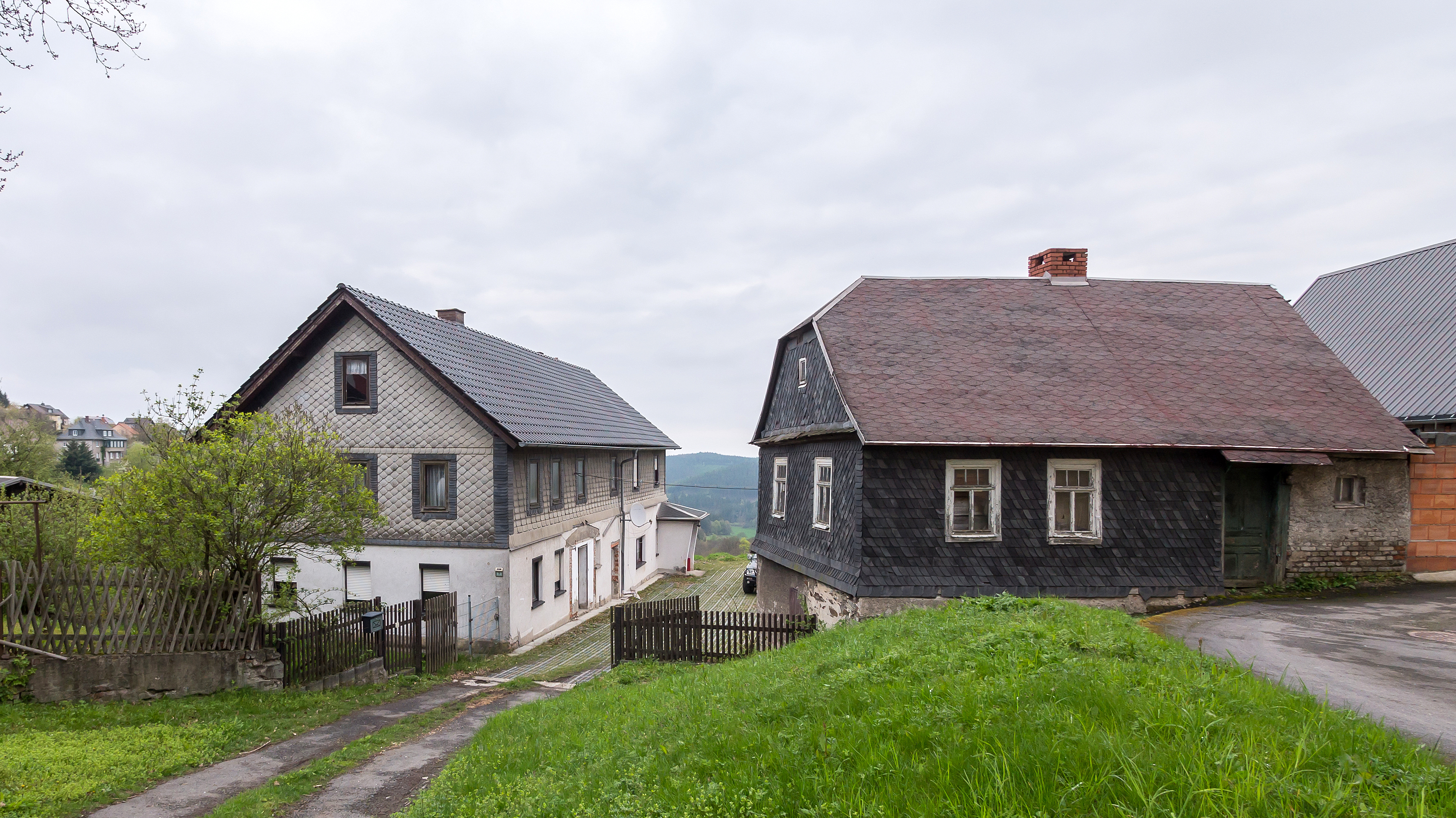 Arnsgereuth Ortsstraße 7 I